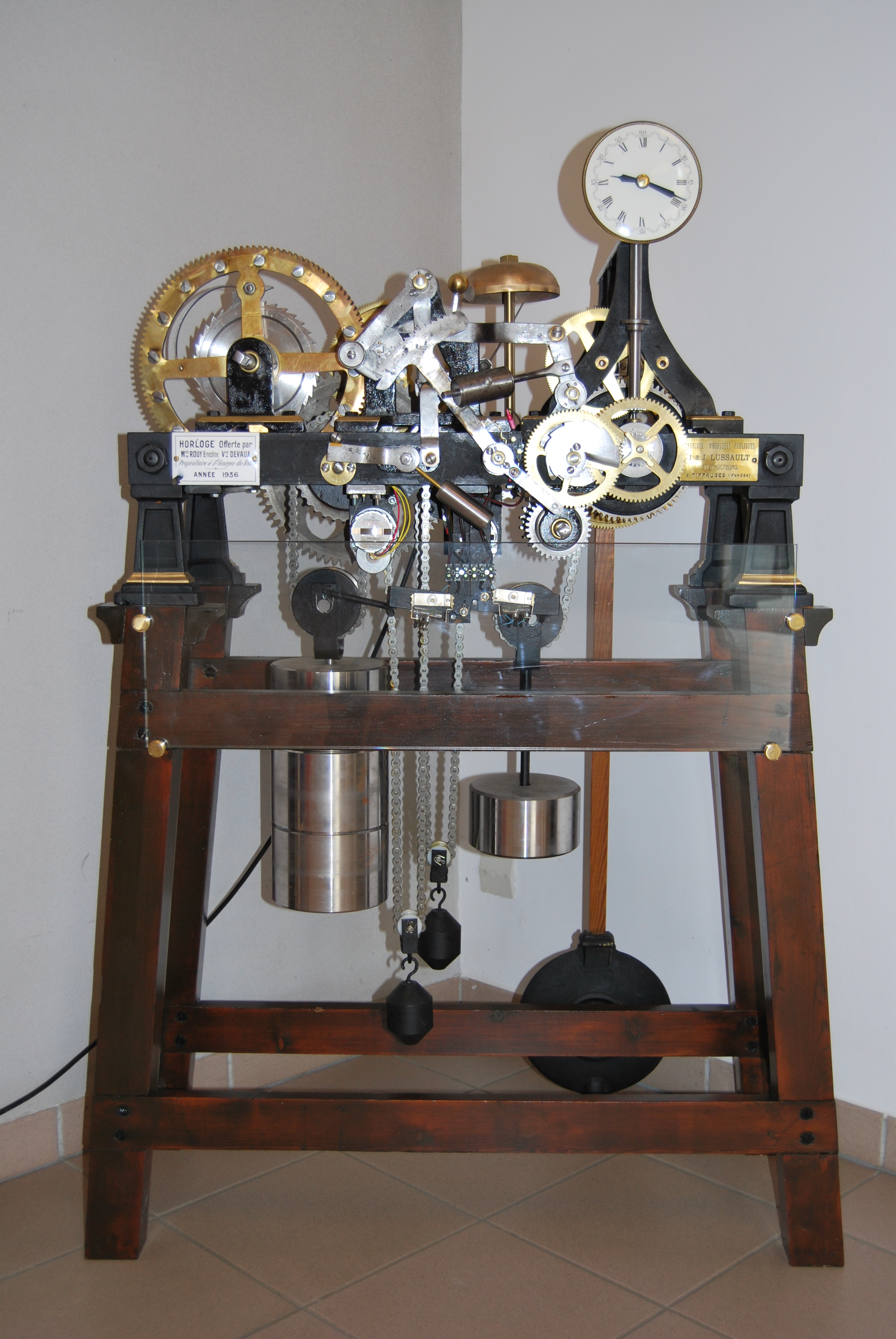 ancienne horloge de l'église de saint georges du bois (sarthe) rénovée et exposée dans la salle du conseil municipal